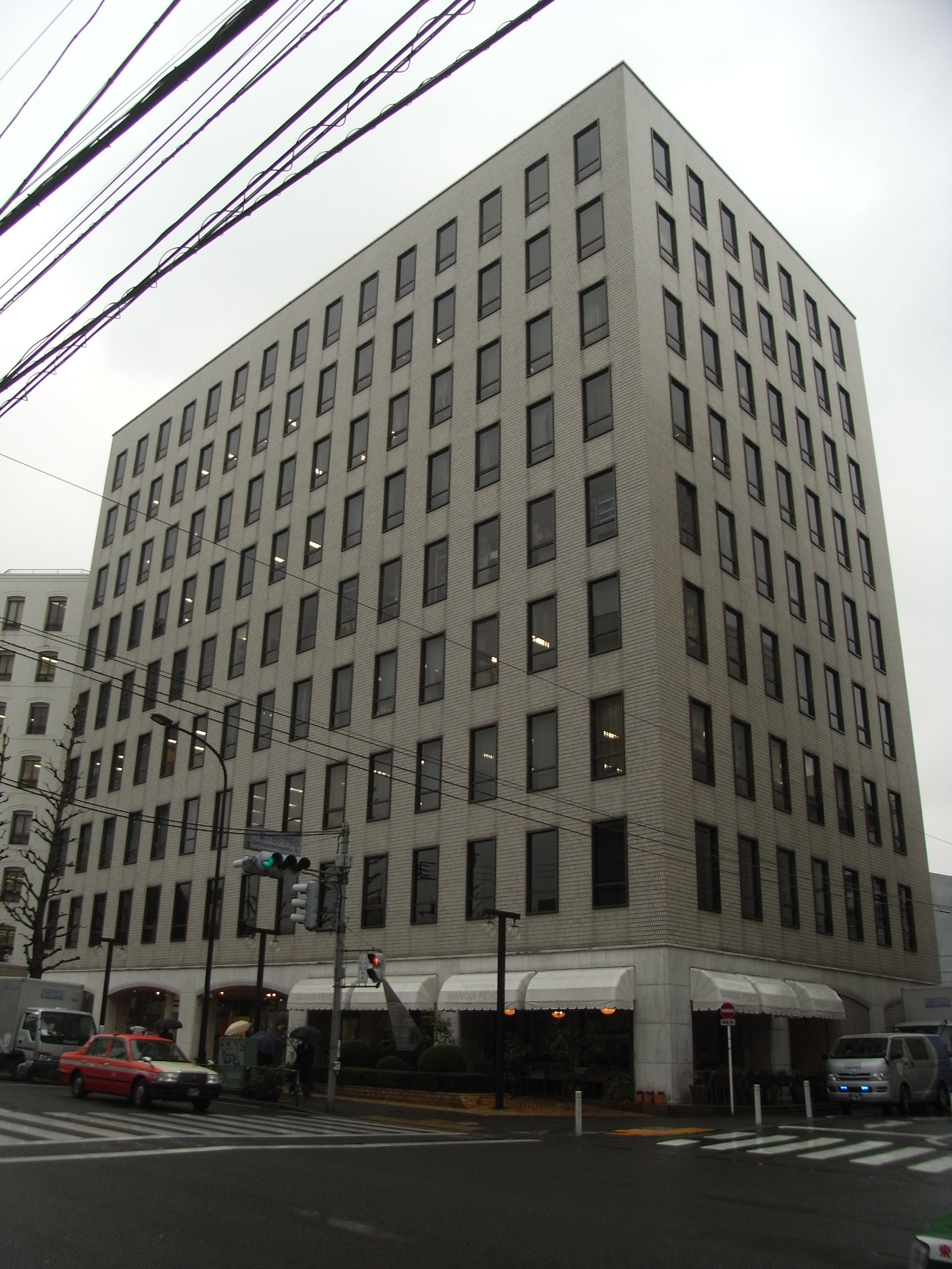 明星食品の本社外観。東京都渋谷区千駄ケ谷3丁目。